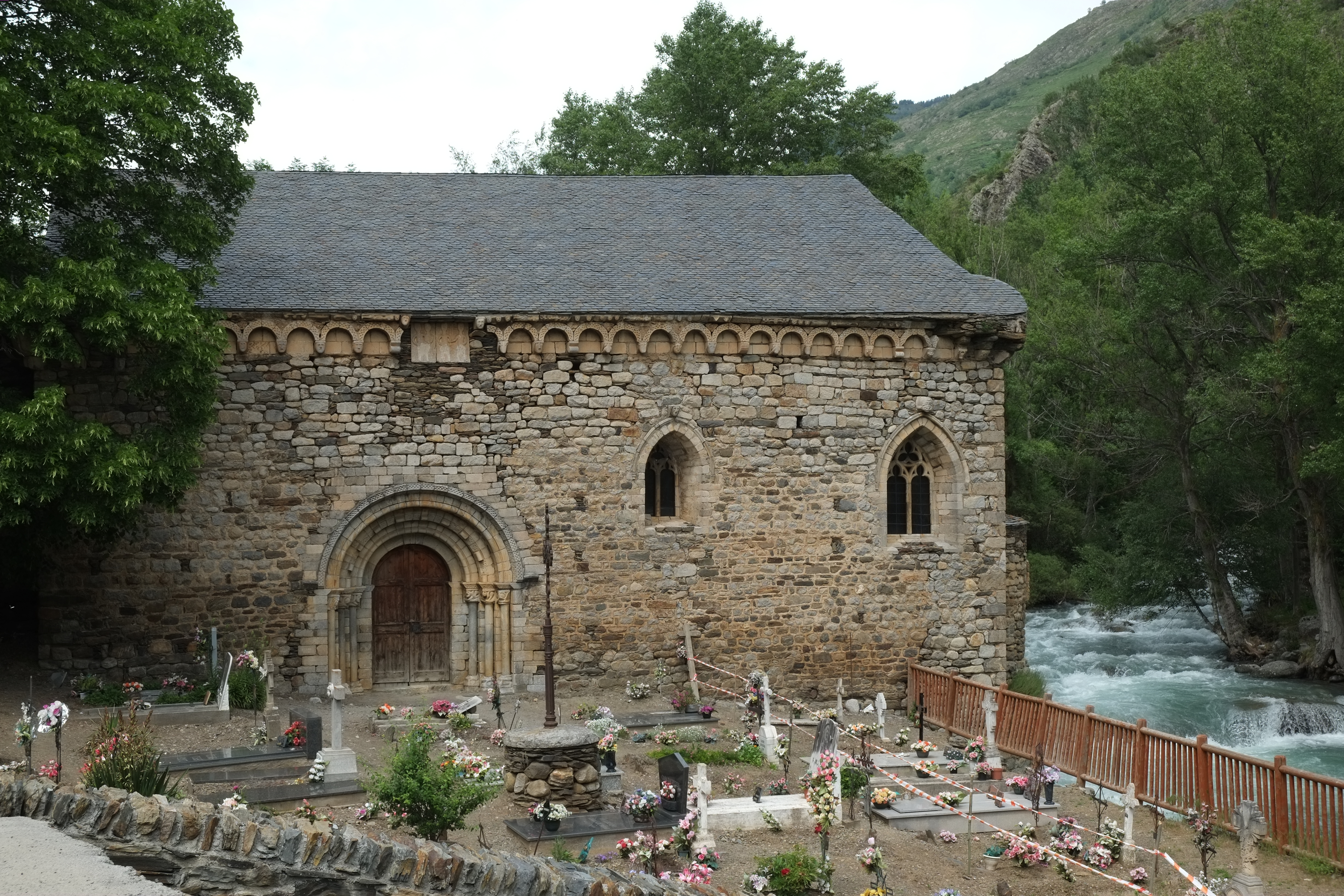 Kirche Sant Joan in Isil in der Provinz Lerida in Katalonien (Spanien)